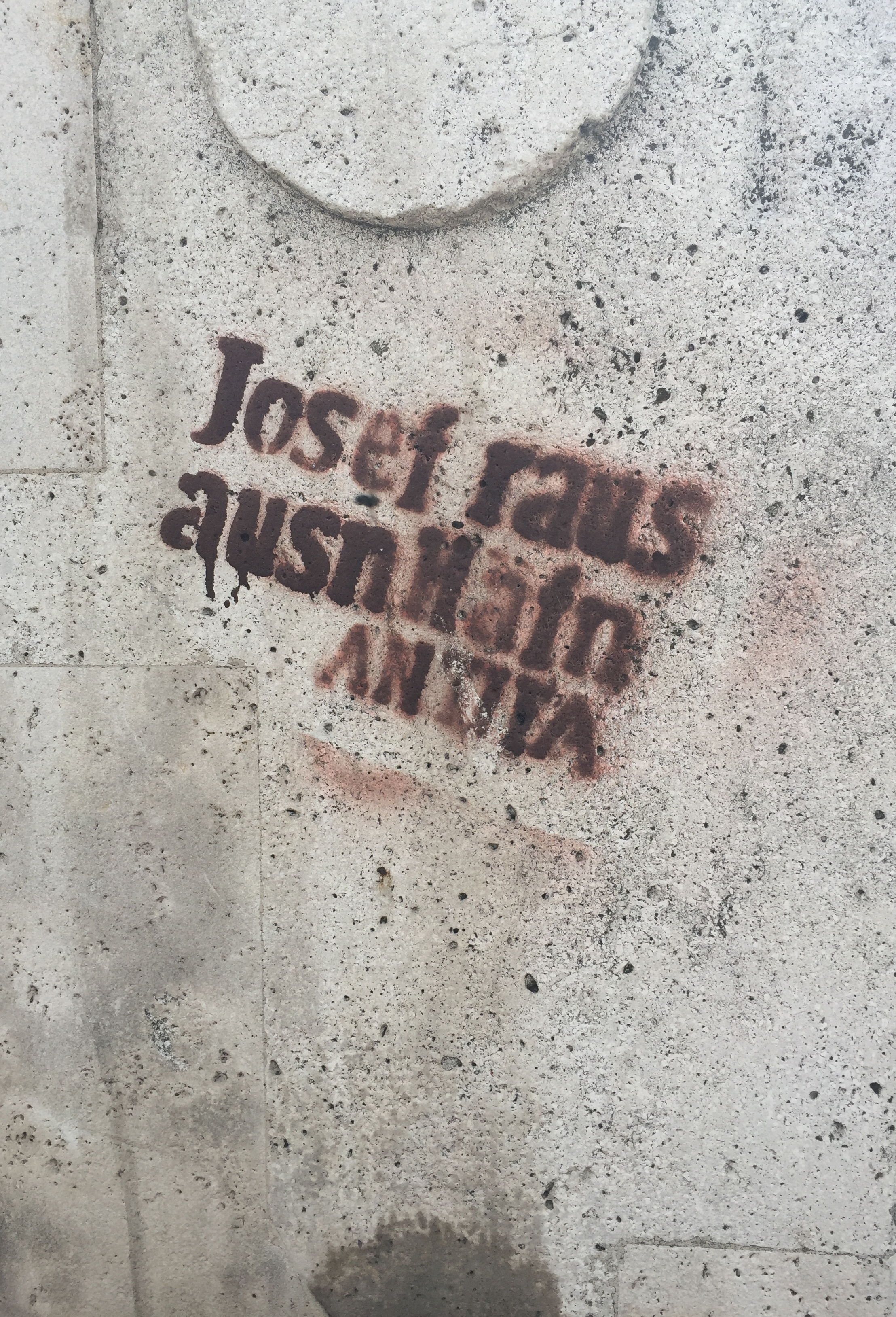 Antifa-Graffito in Wien: Josef raus ausn Häfn